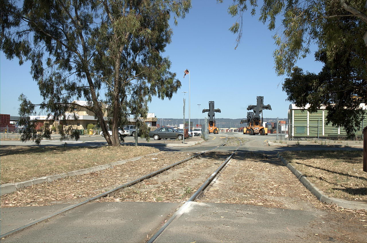 Kewdale Freight Terminal. Perth, Western Australia.